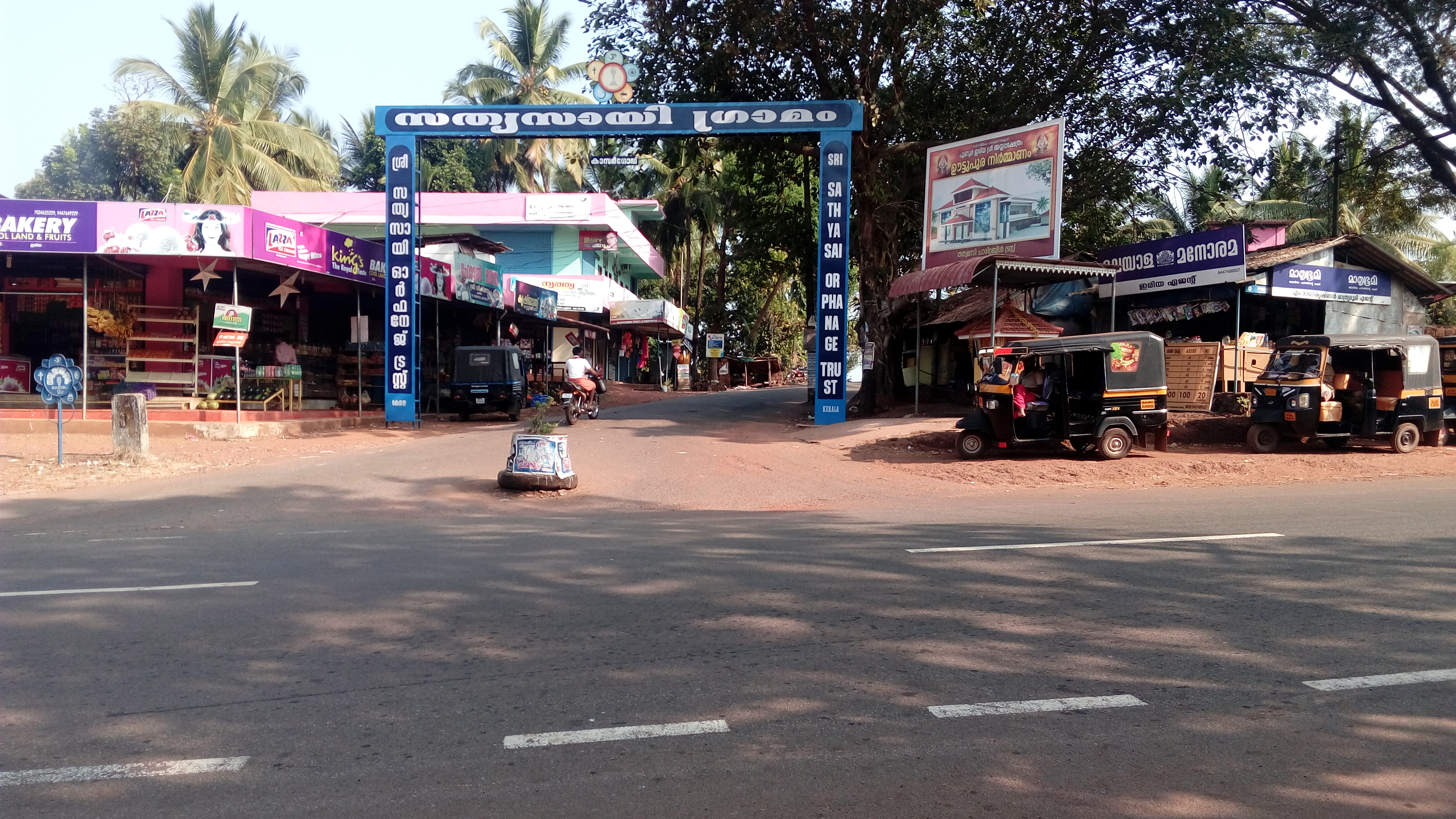 ഇരിയ ബസ് സ്റ്റാൻഡ്, പുതിയതായി സമീപത്ത് വന്ന സ്ത്യസായി ഗ്രാമത്തിലേക്കുള്ള കവാടം ബാനർ കൂടി കാണാം